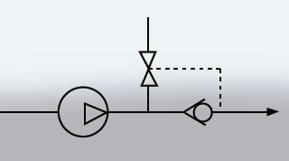 schemat obrazujący metodę regulacji sprężarki wyporowej za pomocą upustu ciśnienia